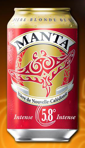 Née sur le caillou, cette bière typiquement calédonienne est fine et légère en amertume mais forte en caractère. Maltée et fruitée, elle a aussi une teneur plus élevée en alcool que la Manta Classique.